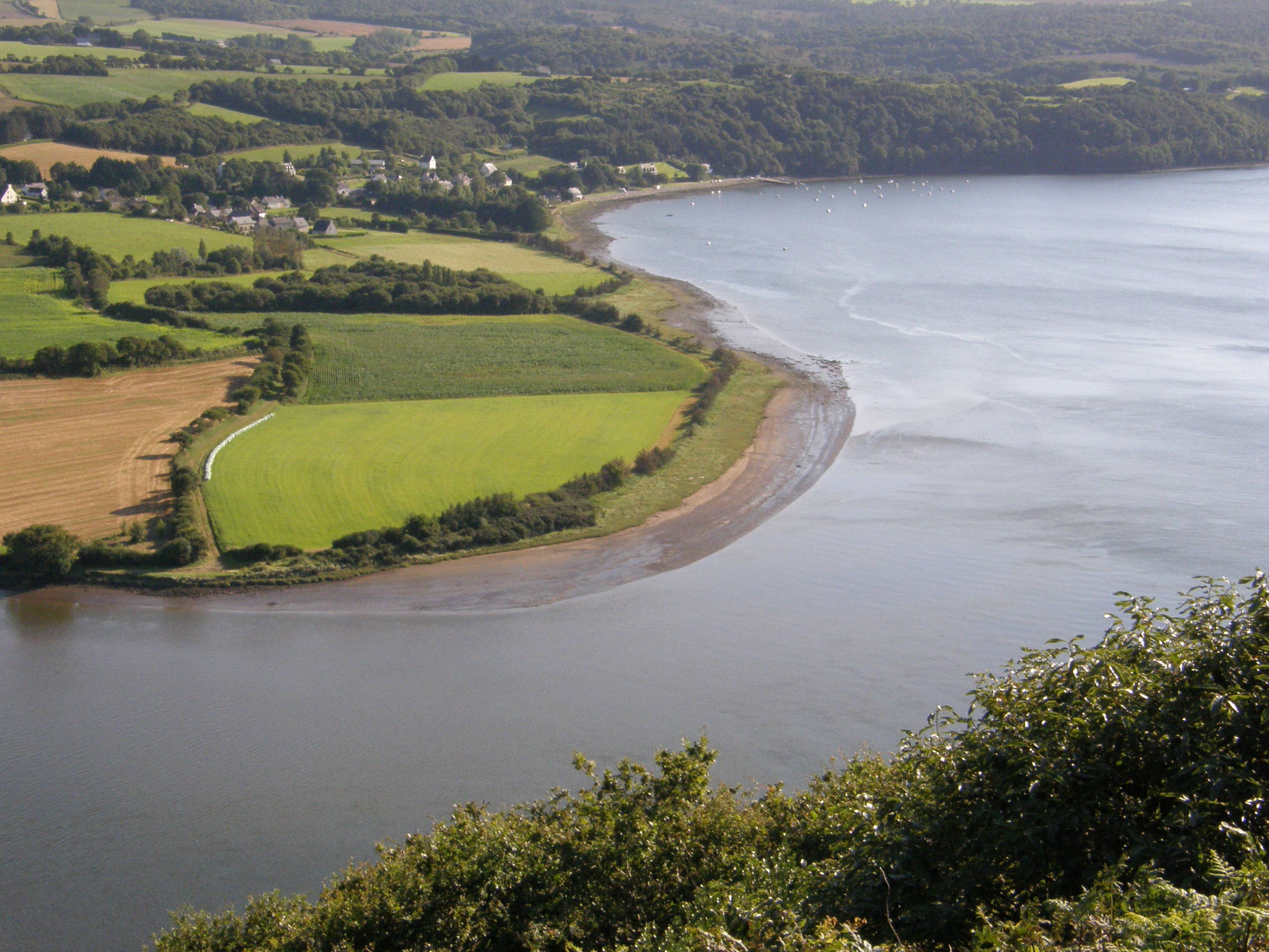 Le village de Trégarvan au creux d'un méandre de l'Aulne - Vue prise du belvédère de Rosnoën.